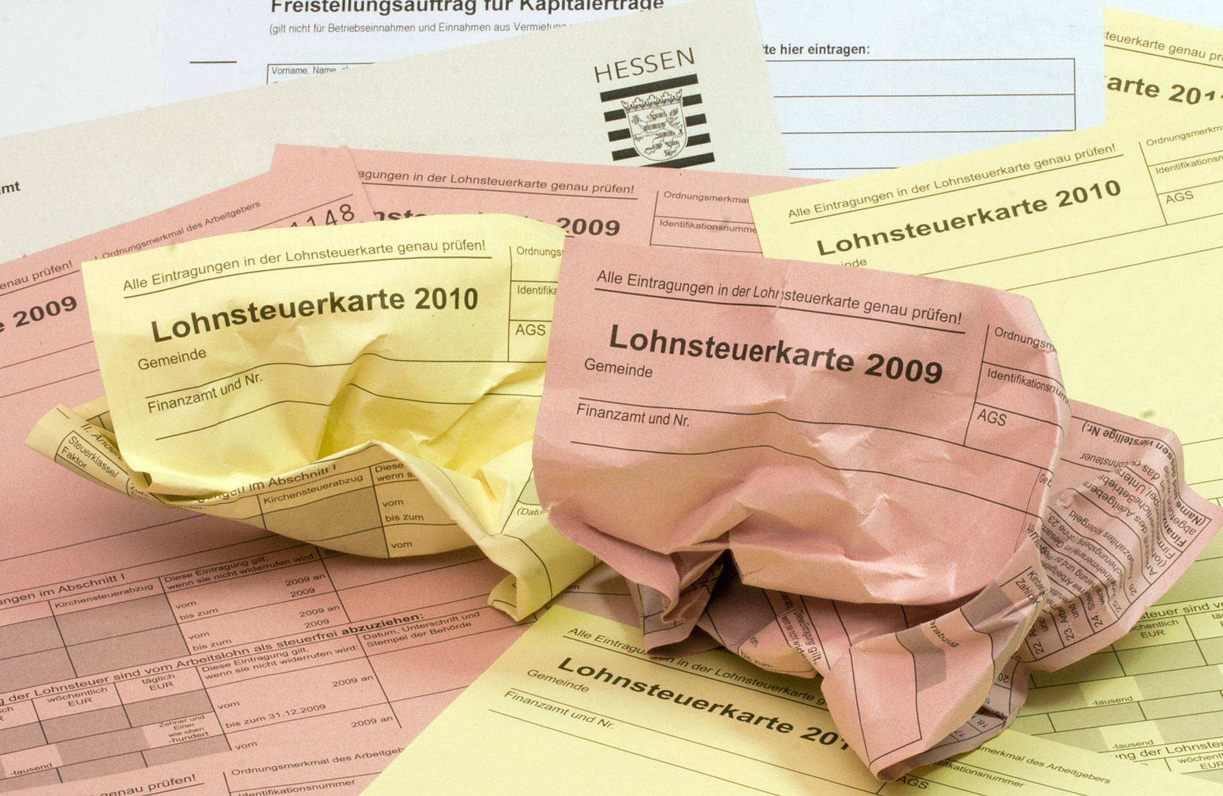 Die Lohnsteuerkarte hat ausgedient. Für 2011 werden keine neuen Lohnsteuerkarten ausgestellt.